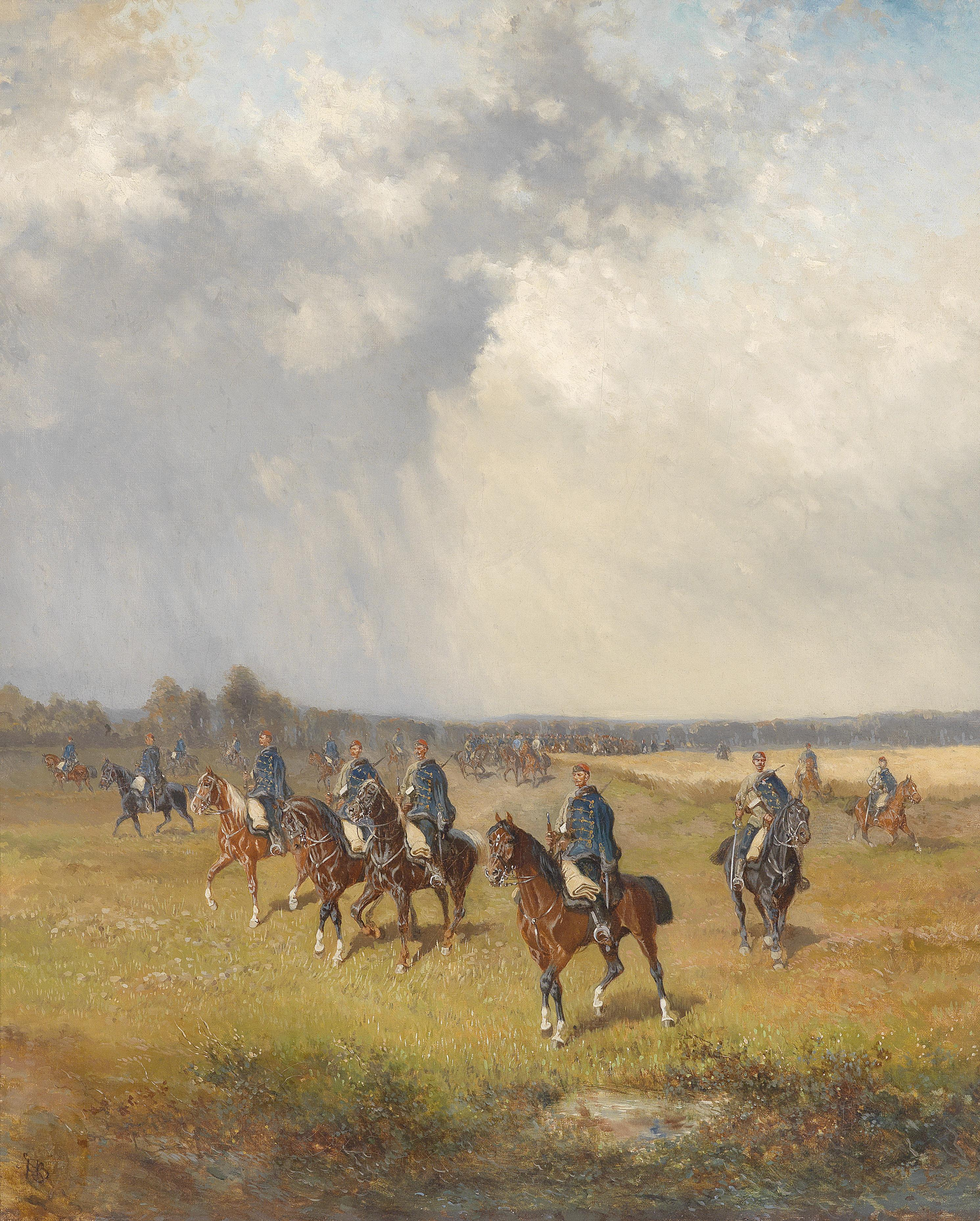 Ungarische Husaren